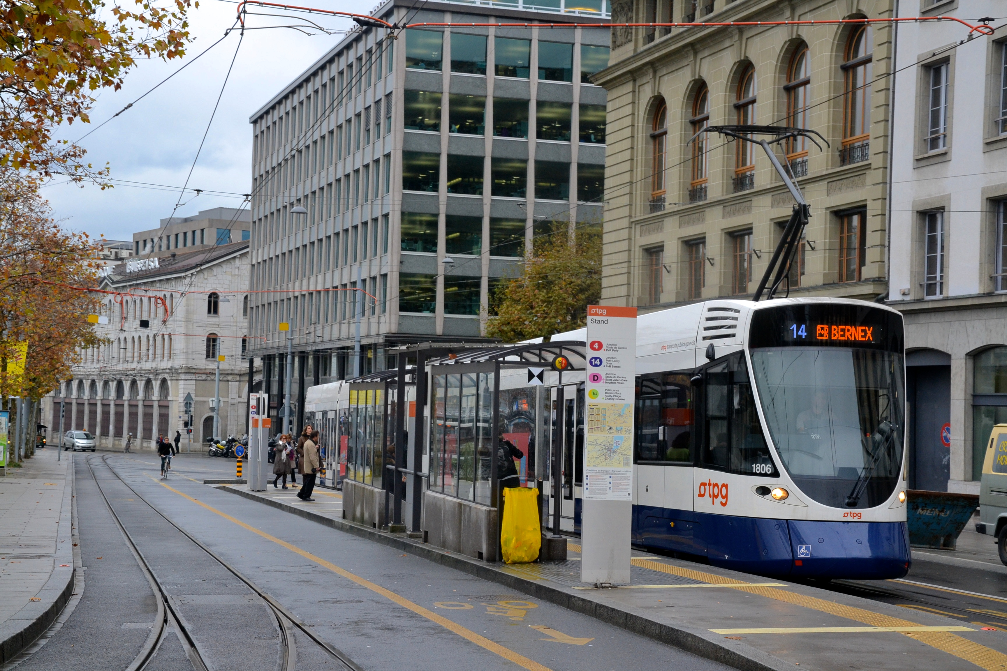 Tramway à l'arrêt Stand (ligne 14 du tramway de Genève).